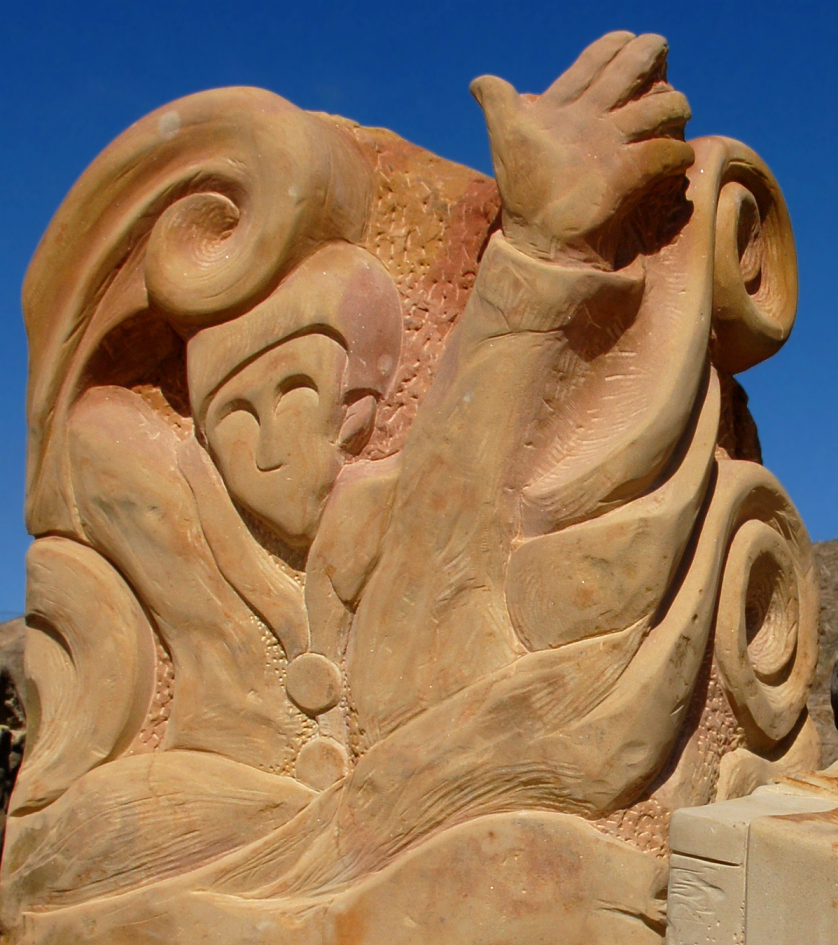 Baltrum. Tjark Evers Denkmal in den Dünen von Bernd Clemenz-Weber (2015)